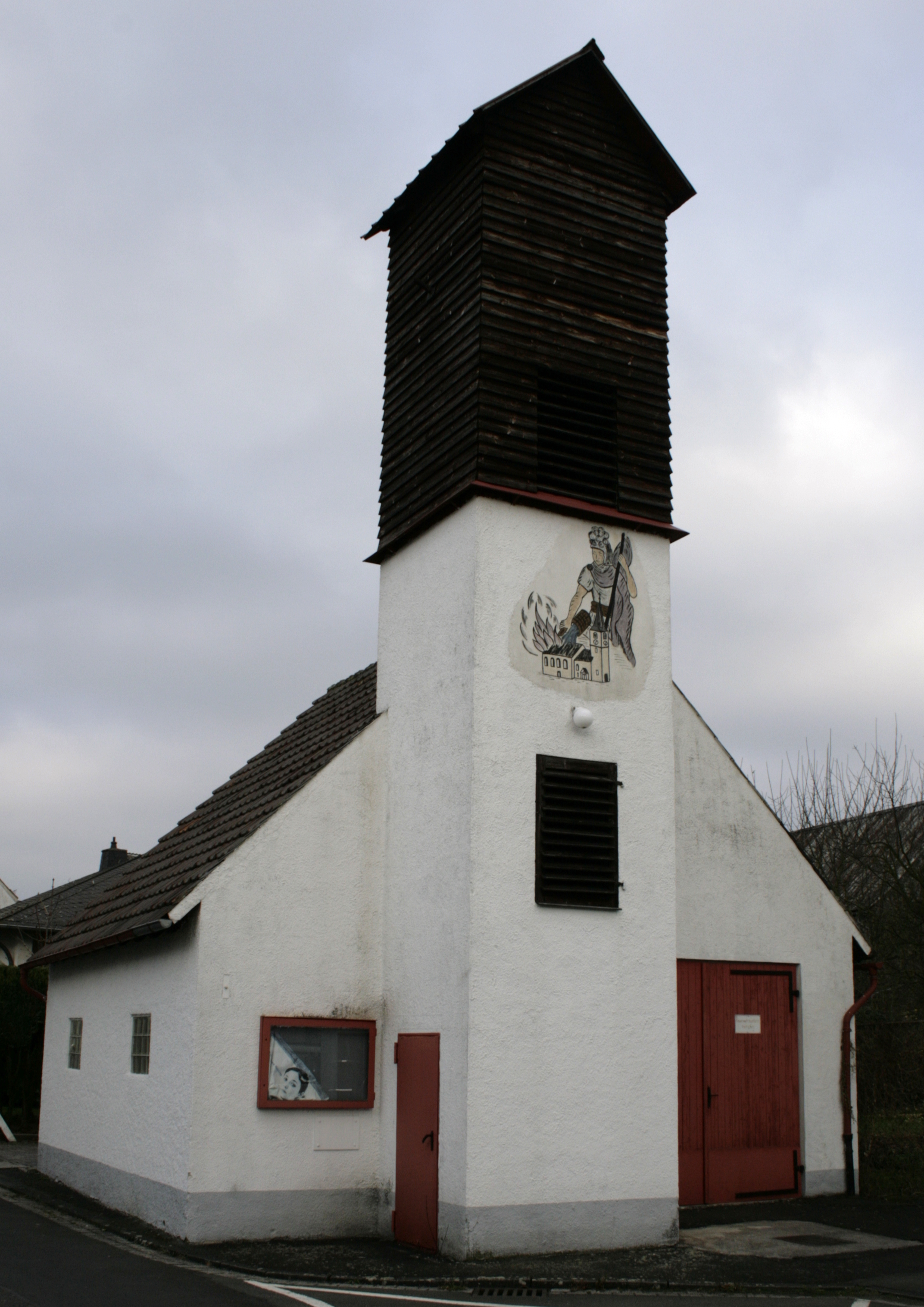 Feuerwehrhaus in Hadamar-Oberweyer, Deutschland